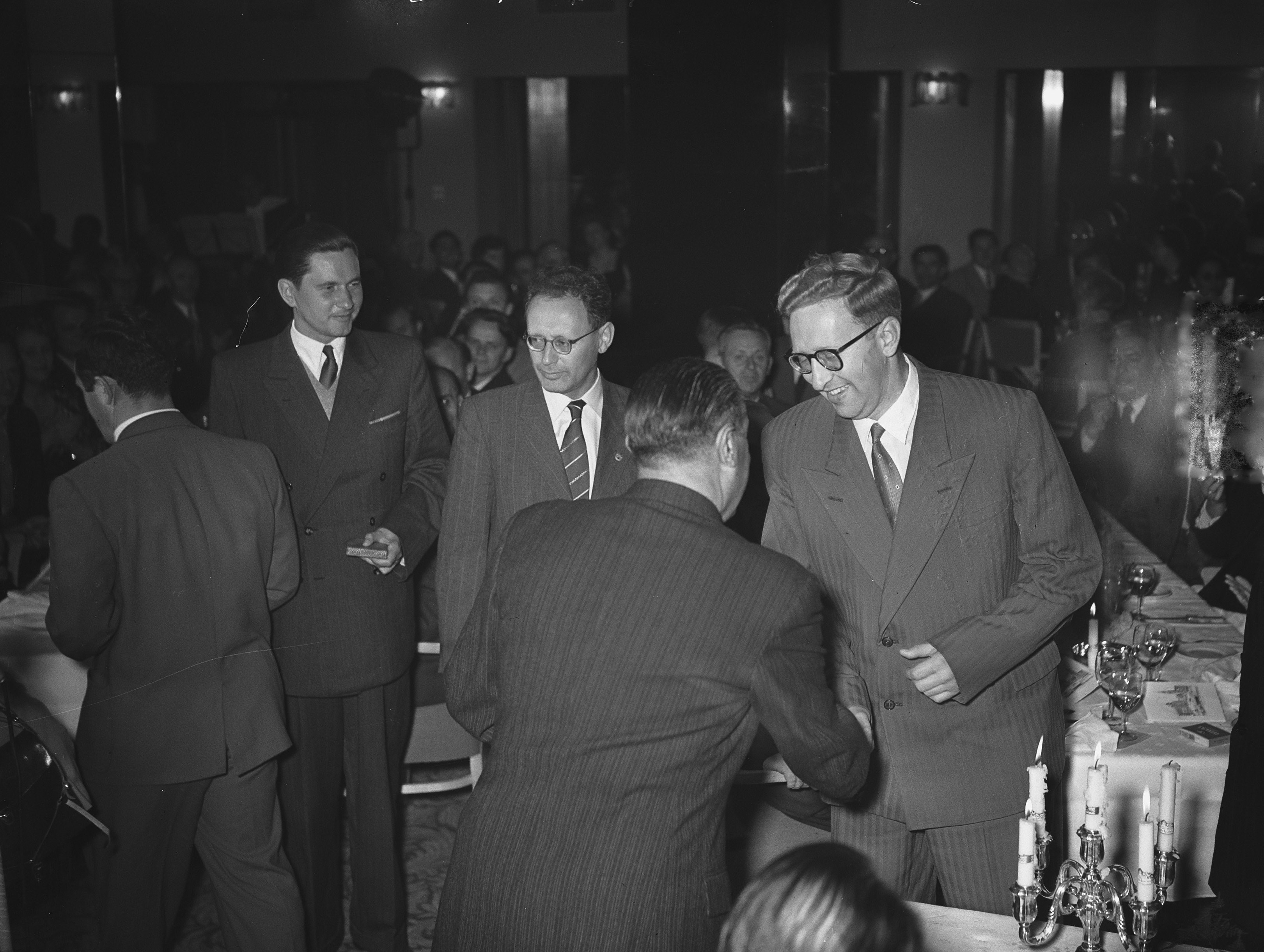 Collectie / Archief : Fotocollectie Anefo Reportage / Serie : [ onbekend ] Beschrijving : Prijsuitreiking schaakolympiade Amsterdam Datum : 25 september 1954 Locatie : Amsterdam, Noord-Holland Trefwoorden : Prijsuitreikingen, schaakolympiades Fotograaf : Bilsen, Joop van / Anefo Auteursrechthebbende : Nationaal Archief Materiaalsoort : Glasnegatief Nummer archiefinventaris : bekijk toegang 2.24.01.09 Bestanddeelnummer : 906-7462